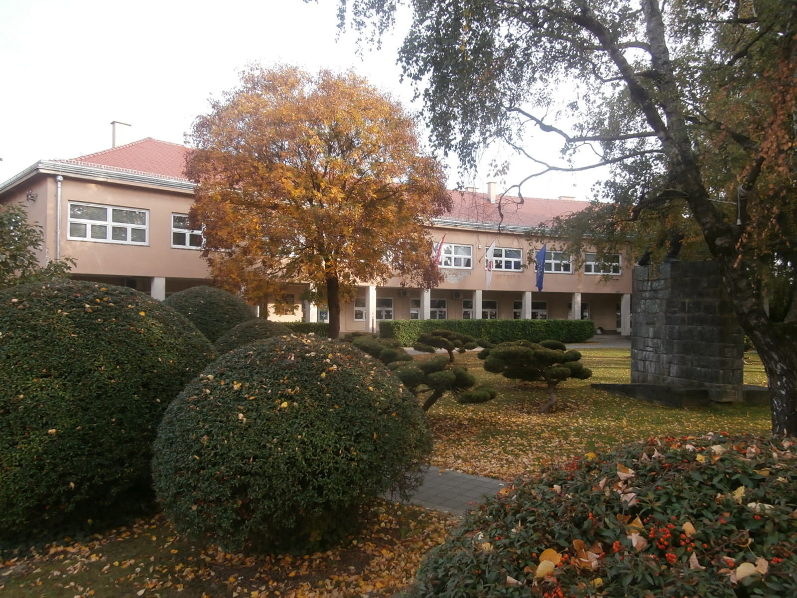 Sveti Ivan Zelina - zgrada gradskog poglavarstva